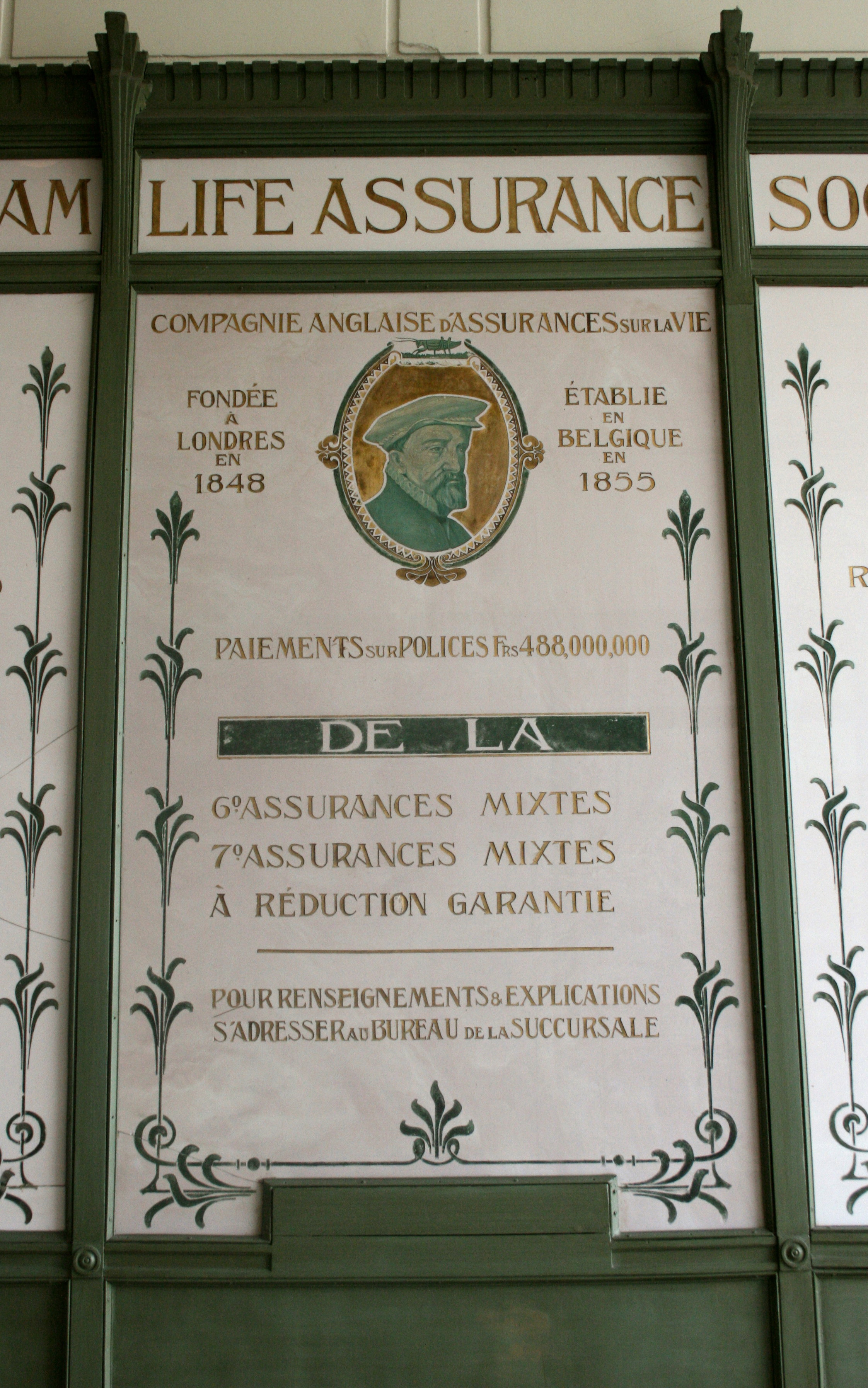 Place Royale 3, Bruxelles (Belgique). Bâtiment connu sous le nom "Hôtel Gresham". Intérieur Art Nouveau